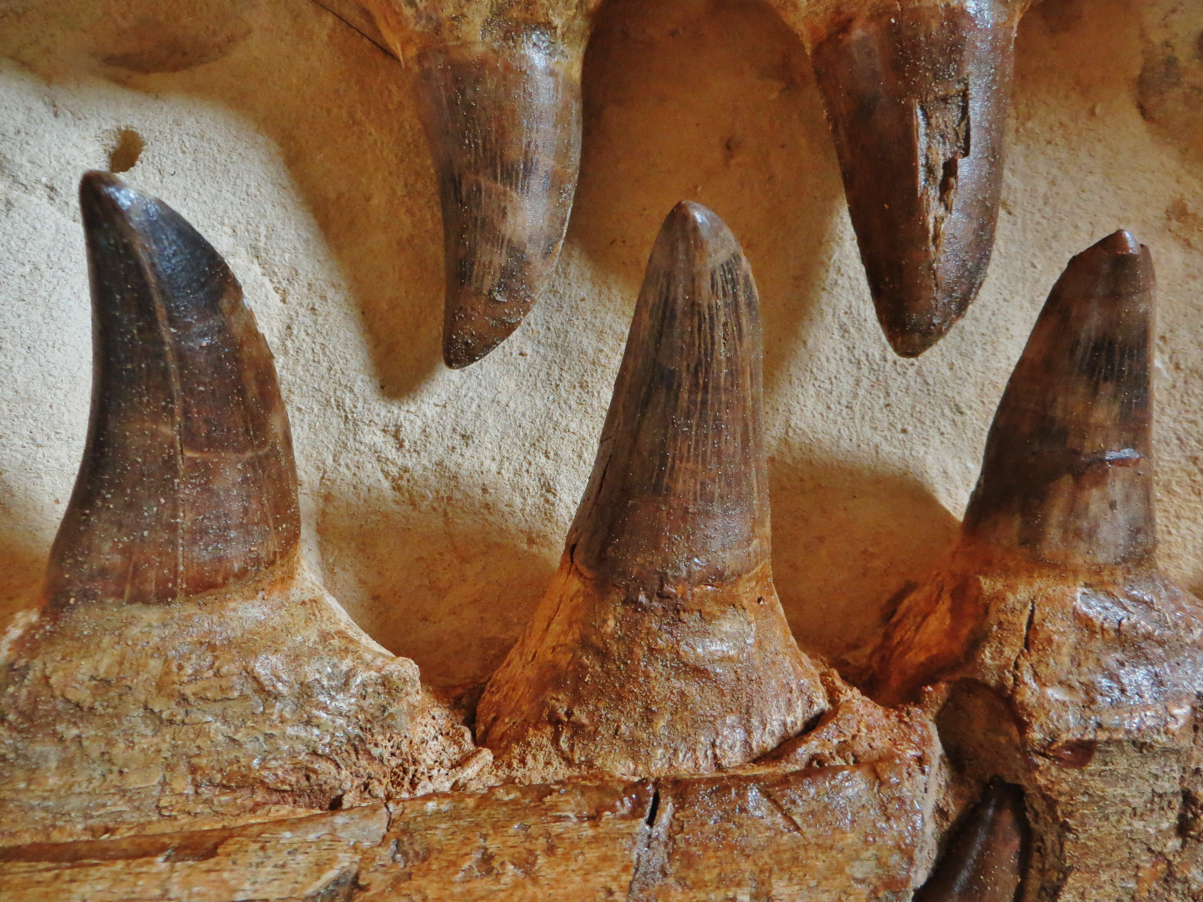 Fossil mosasaur - Took the picture at Teylers Museum, Haarlem